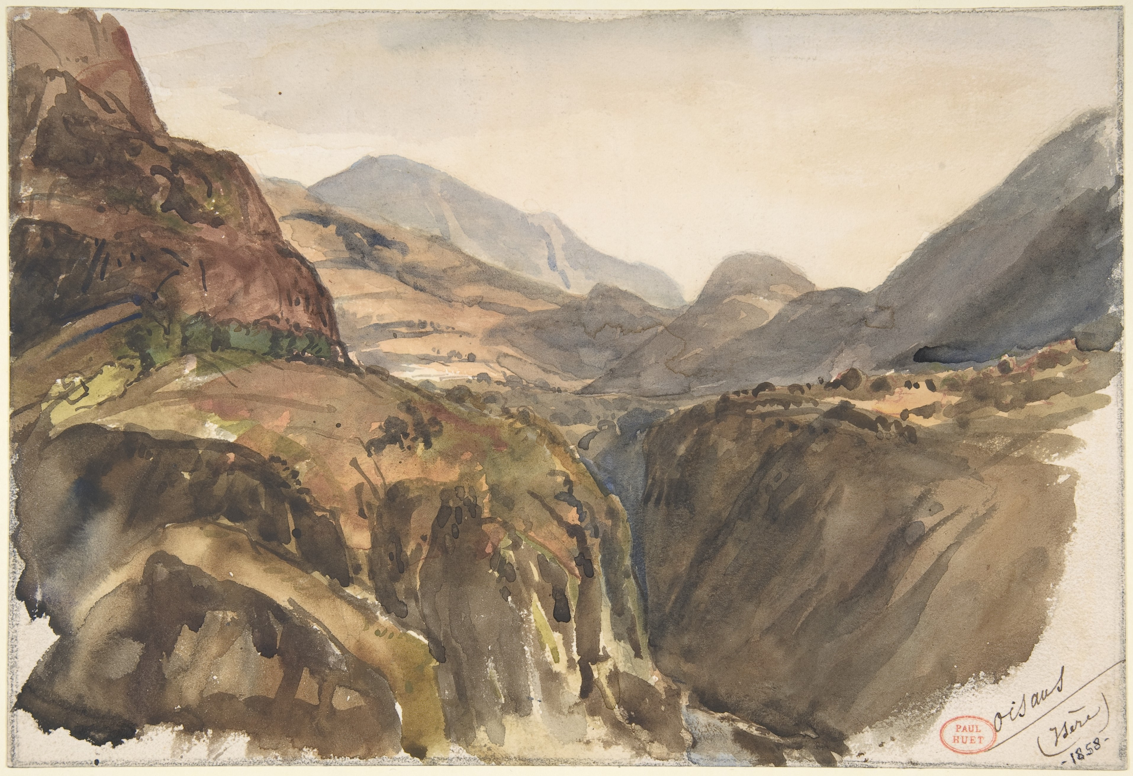 Drawing; Drawings